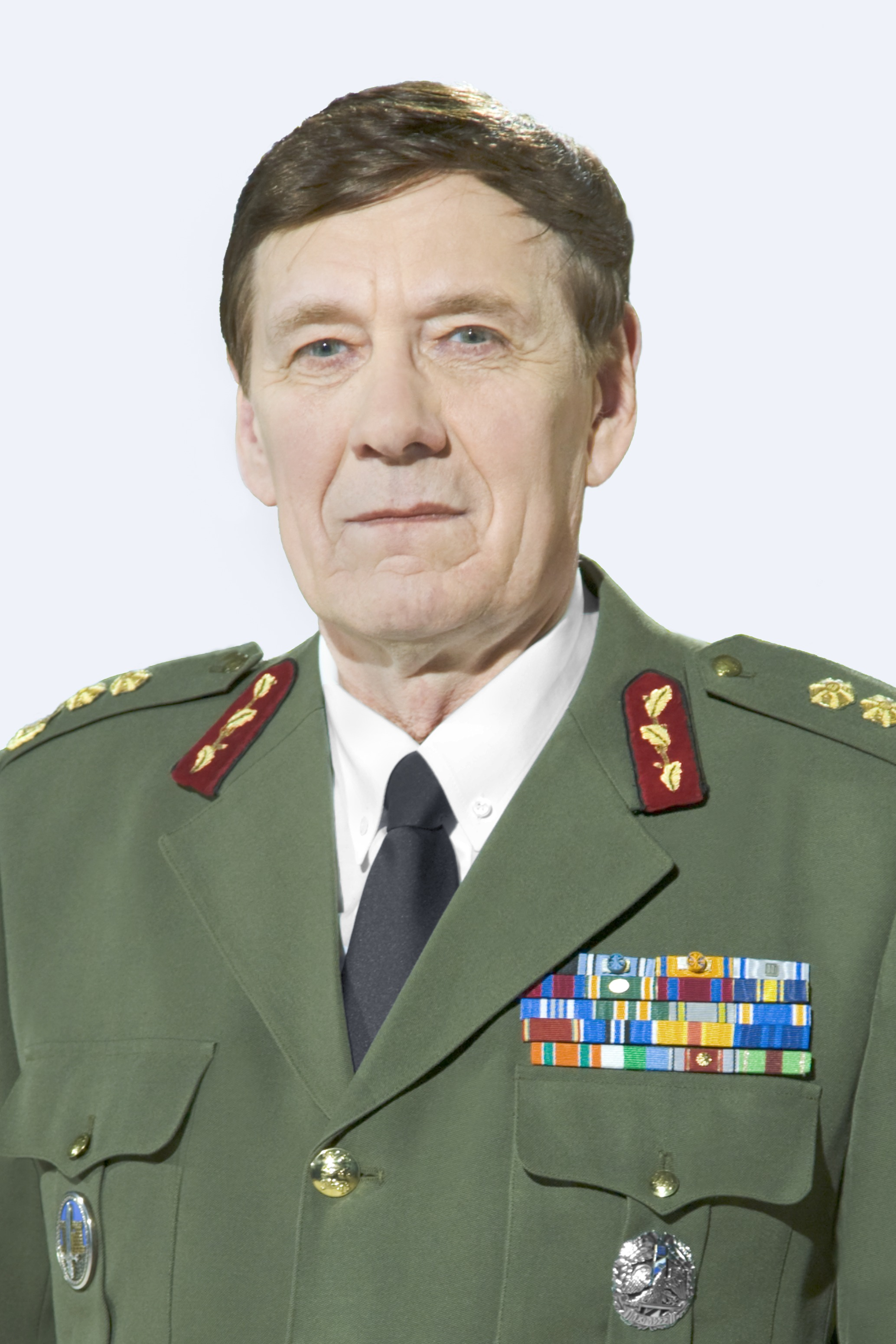 Kindralmajor Harry Hein.